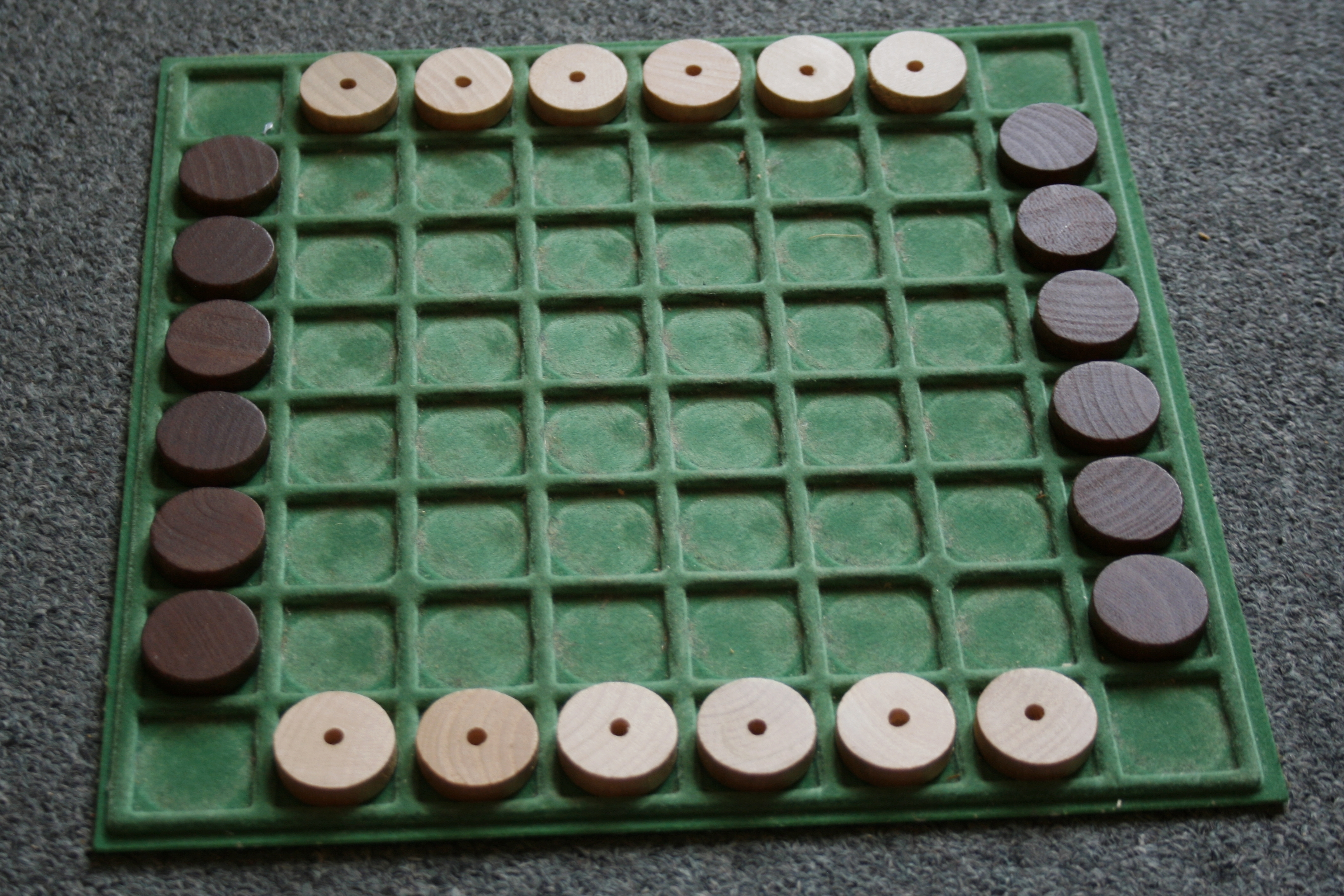 Stolní hry upravené pro potřeby zrakově postižených